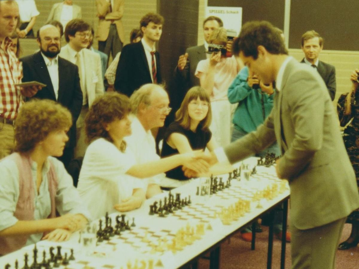 Ulrich Wildgruber 1985 in Hamburg bei einem Simultanspiel des späteren Schachweltmeisters Garry Kasparov, eine Veranstaltung des Nachrichtenmagazins Der Spiegel.